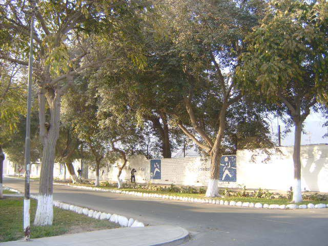 Estadio Municipal de Chaclacayo Fuente: Nestor Ulaf Salcedo Zuta. Coleccion personal. Junio 2006